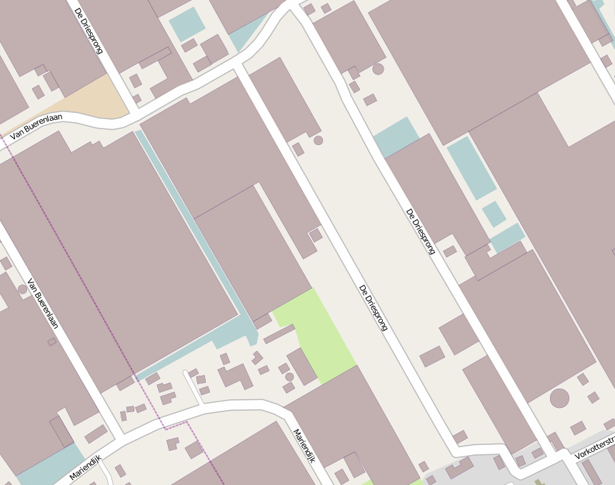 geografische kaart via [1]